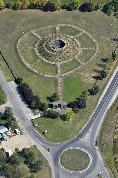 A muhi csata helyszínén épült emlékpark légi fotón 2018-ban